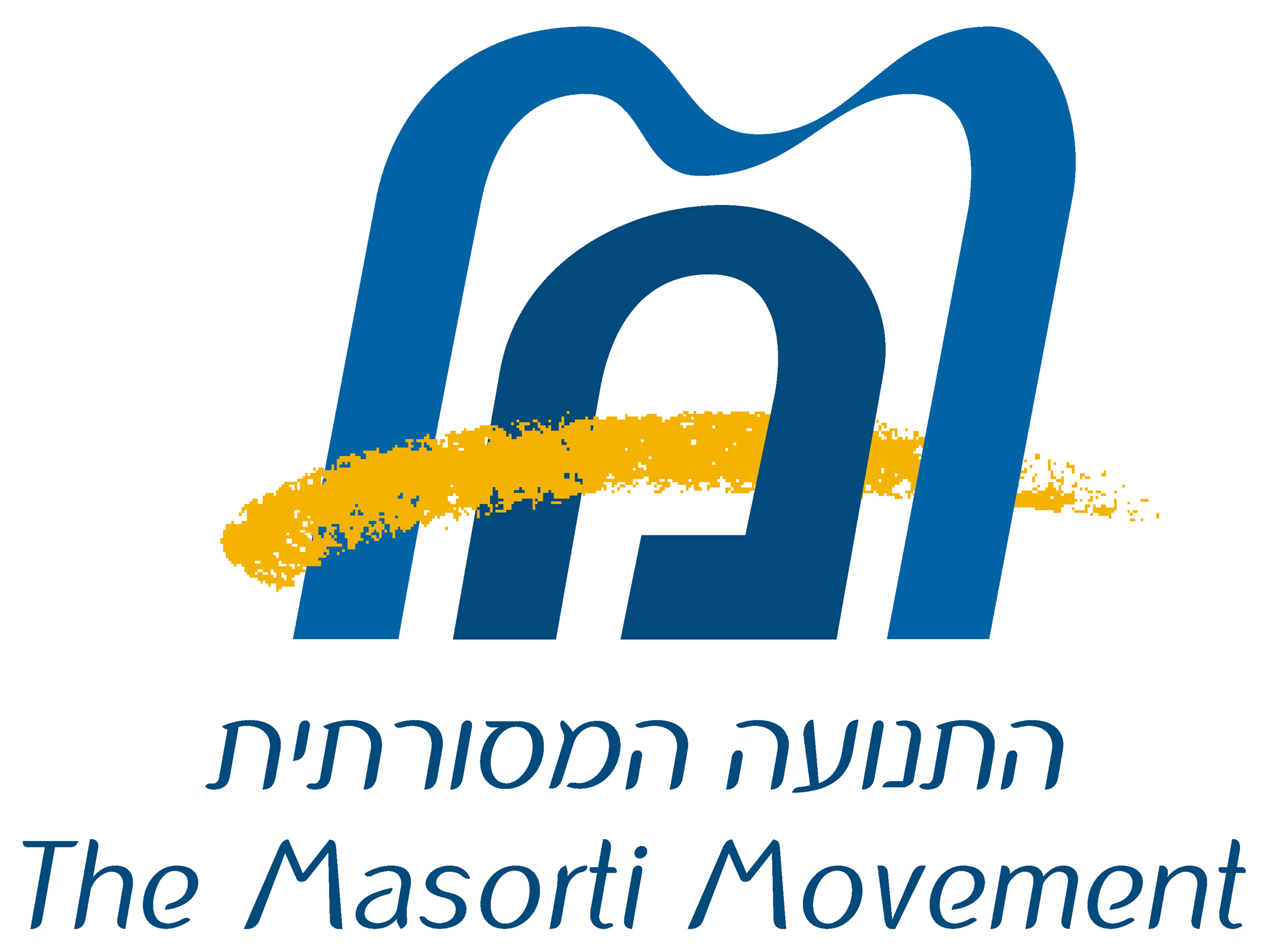 לוגו התנועה המסורתית כיתוב בעברית ובאנגלית